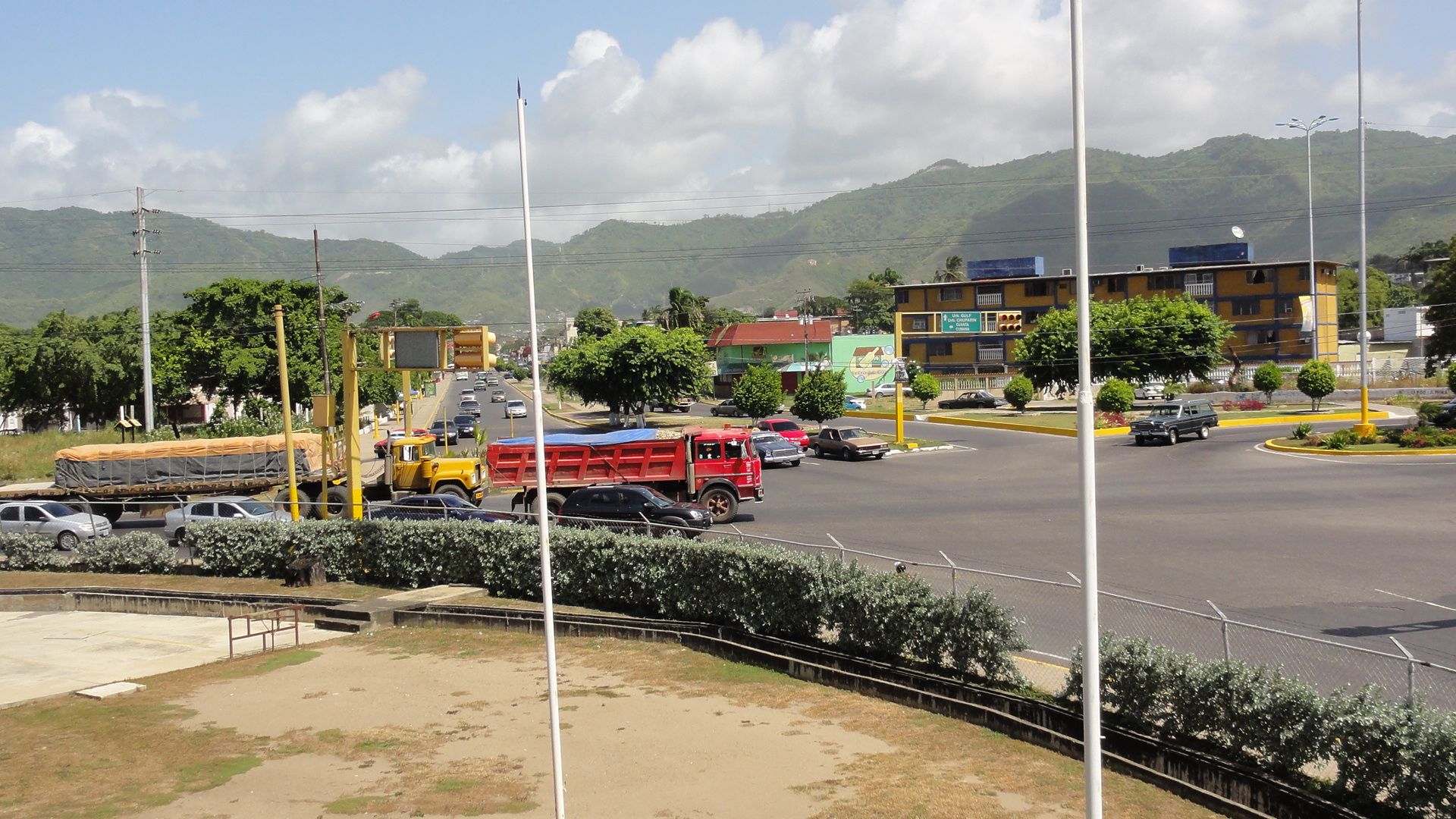 Urbanización Chuparin, Puerto La Cruz, Venezuela